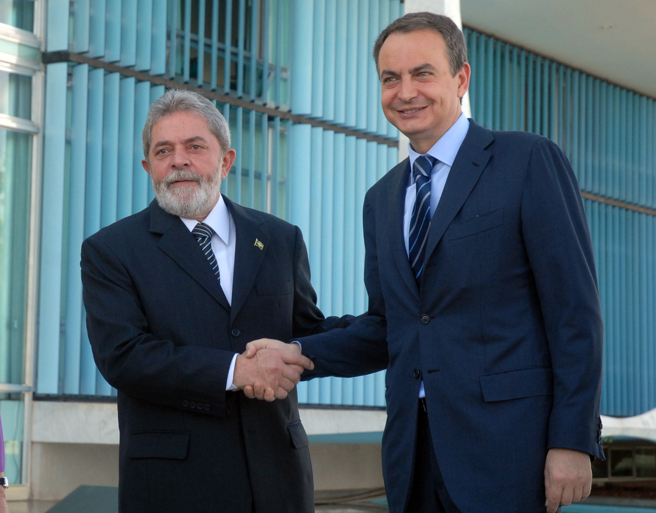 O presidente Luiz Inácio Lula da Silva recebe o primeiro-ministro espanhol, José Luis Zapatero para encontro de trabalho no Palácio da Alvorada